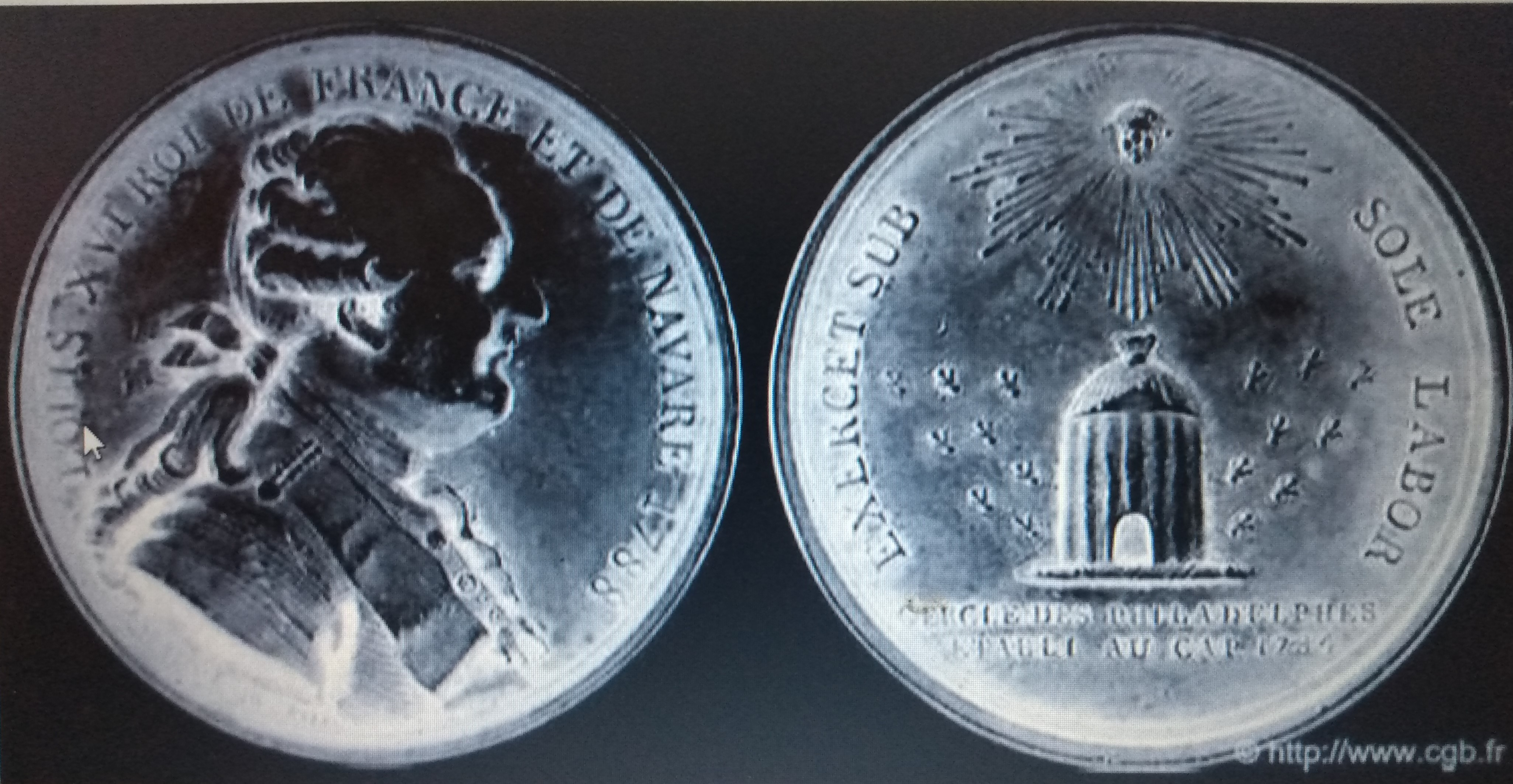 Médaille du Cercle des Philadelphes